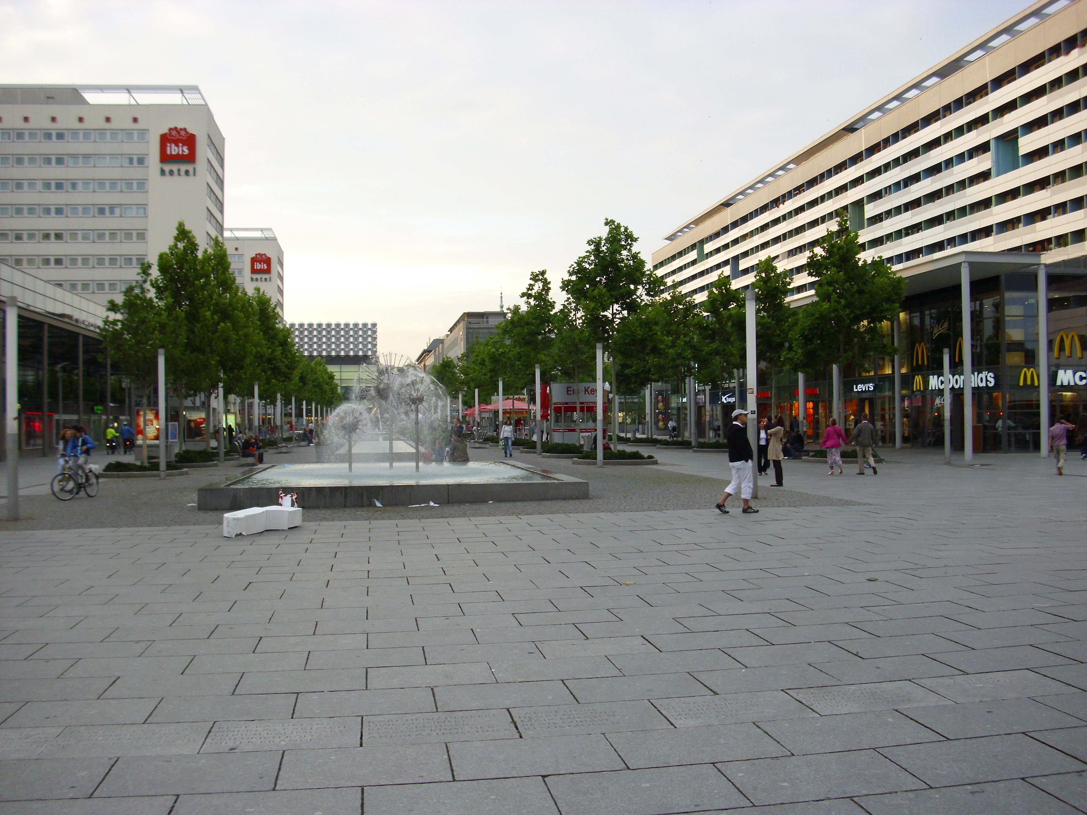 Brunnen und Baumreihen auf der Prager Straße (Blick Richtung Norden)